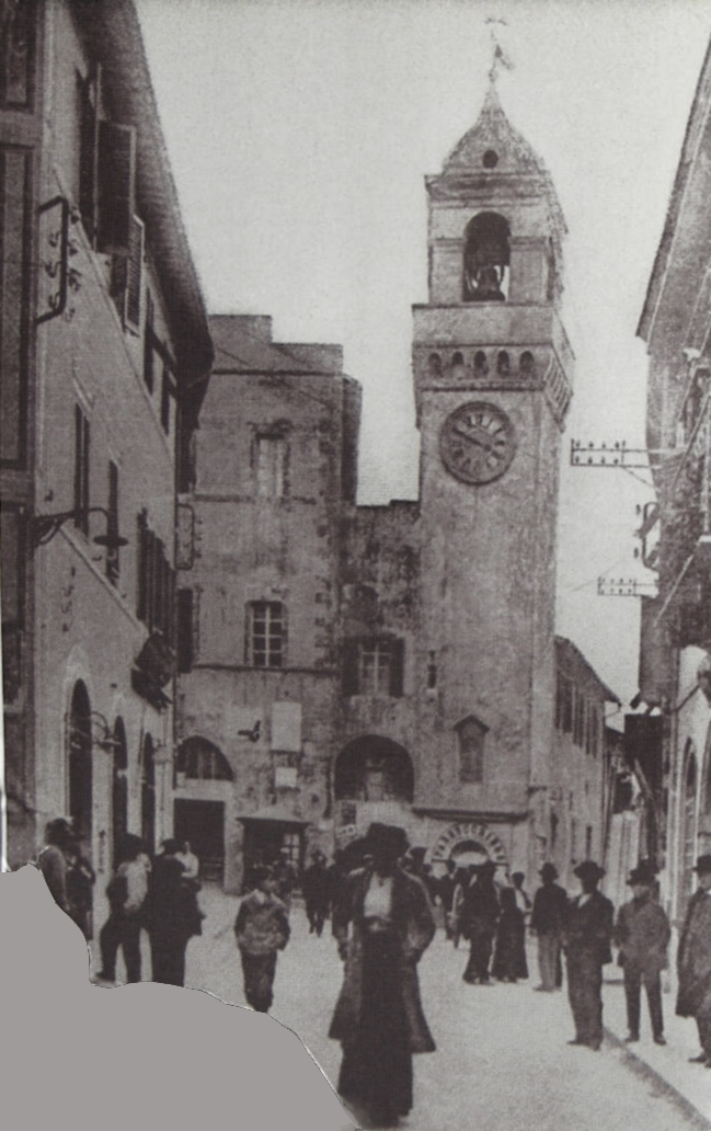 Palazzo_del_comune_di_piombino, beginning of XX century